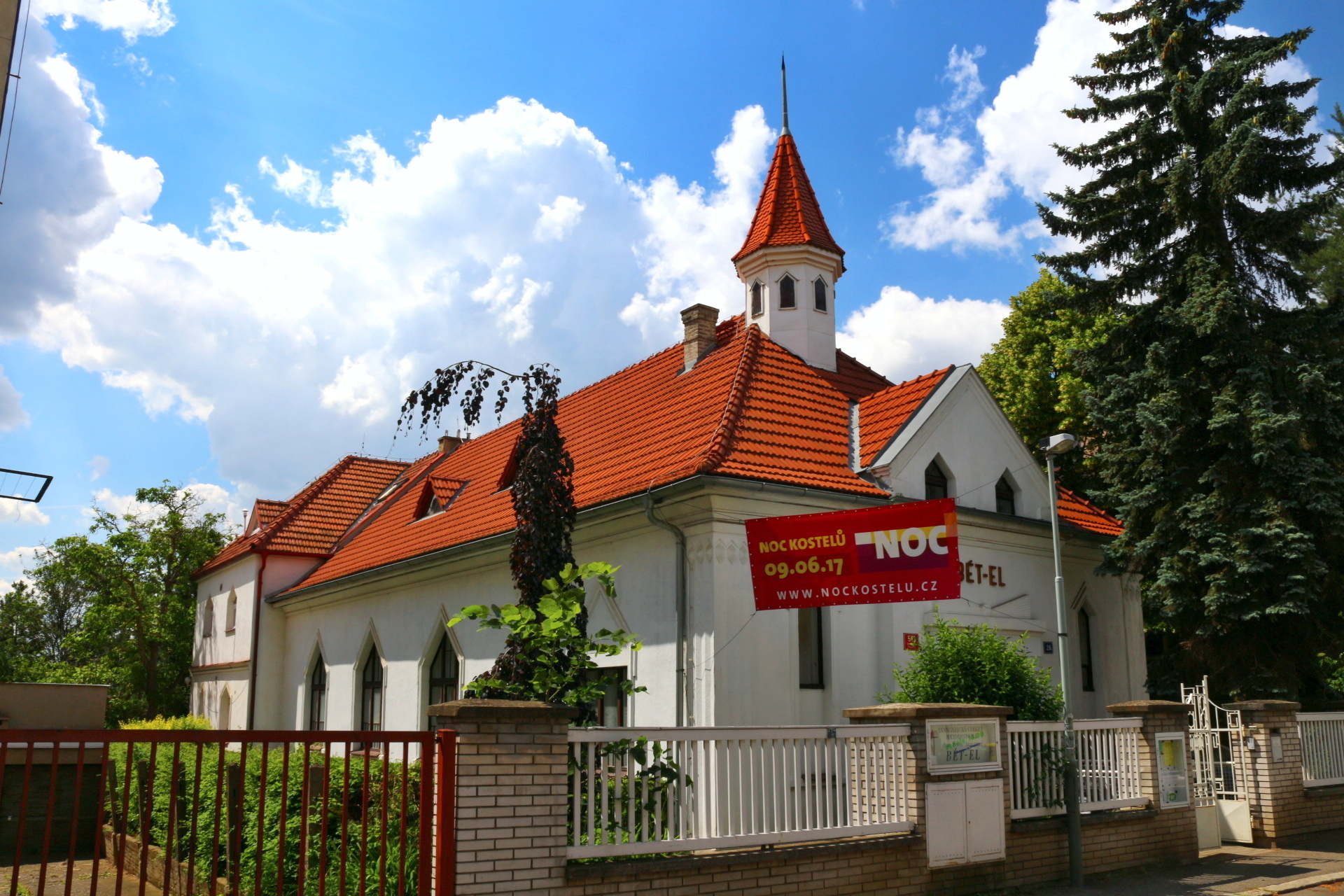 Strašnický Bét El